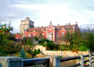 Schloss Prugg (Bruck an der Leitha)